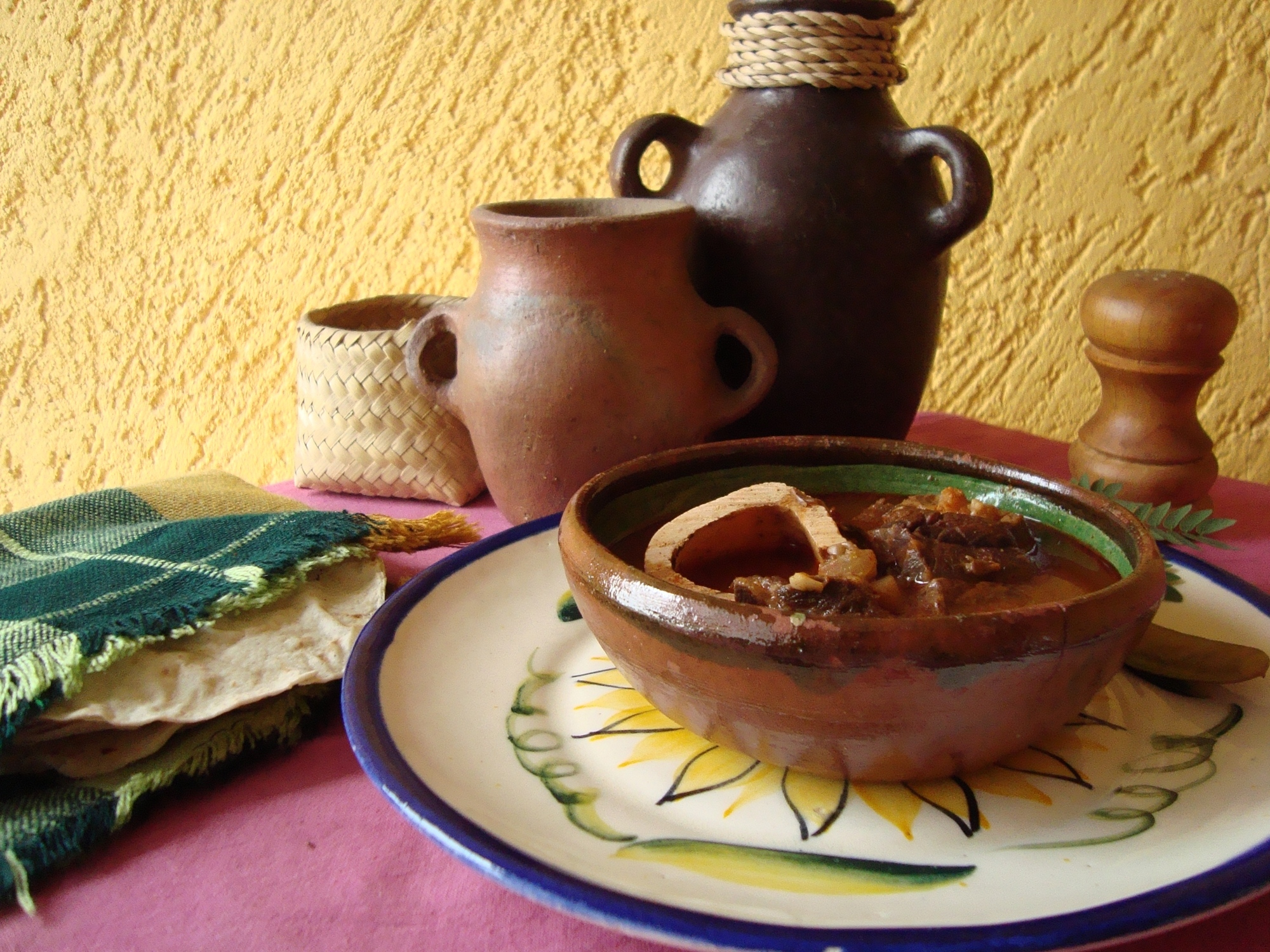 El huaxmole es un plato tradicional de la Mixteca poblana (México) que se realiza a base de chile costeño y semillas de huaje.